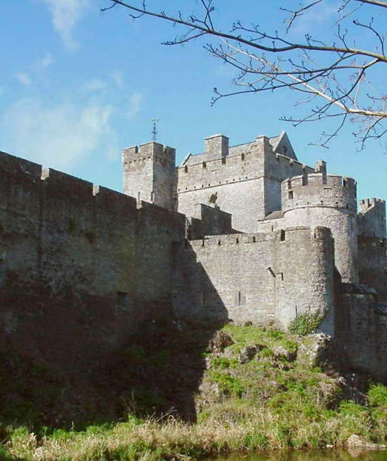 Chateau de Cahir en Irlande.